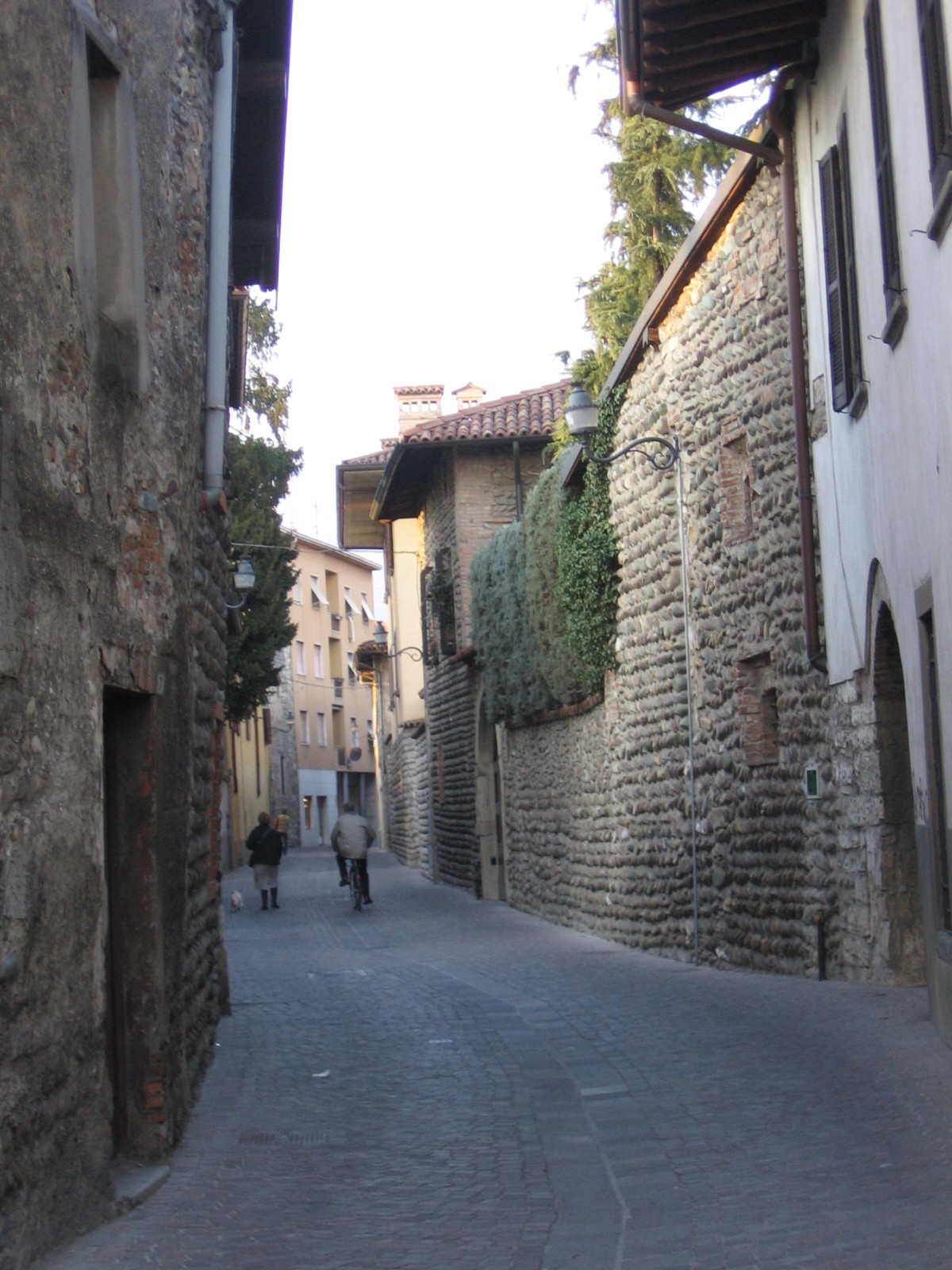 Villa di Serio, Bergamo, Italia